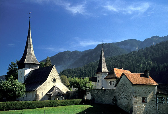 Rougemont: Prioratskirche Saint-Nicolas und Schloss Rougemont